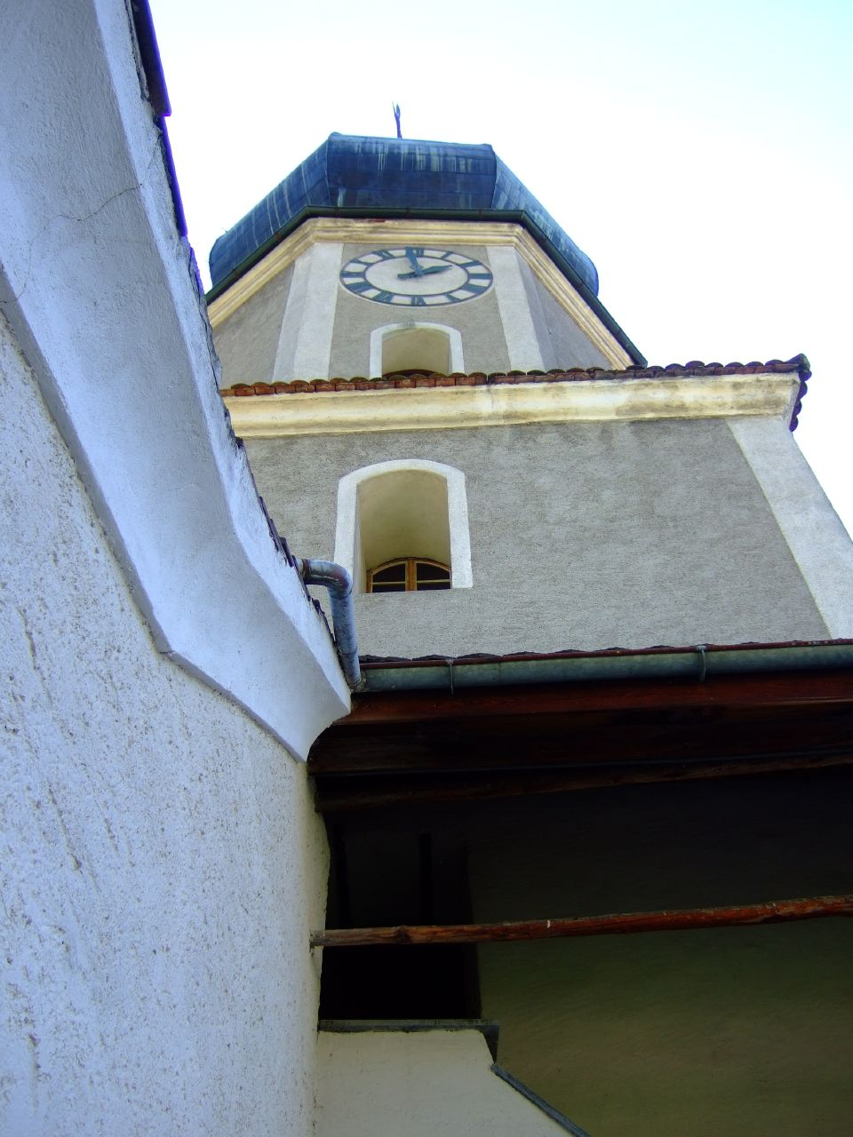 Church tower of the village church in Fläsch, Graubunden, Switzerland